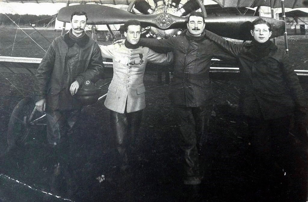 Stéphane de Bissy, officier français, entouré de trois mécaniciens devant son Caudron G.3 dans le nord de la France fin 1914 / début 1915.